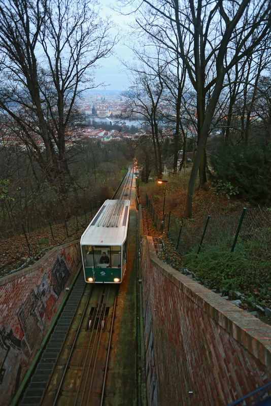 הרכבל שמחבר את פראג לגבעת פטז'ין